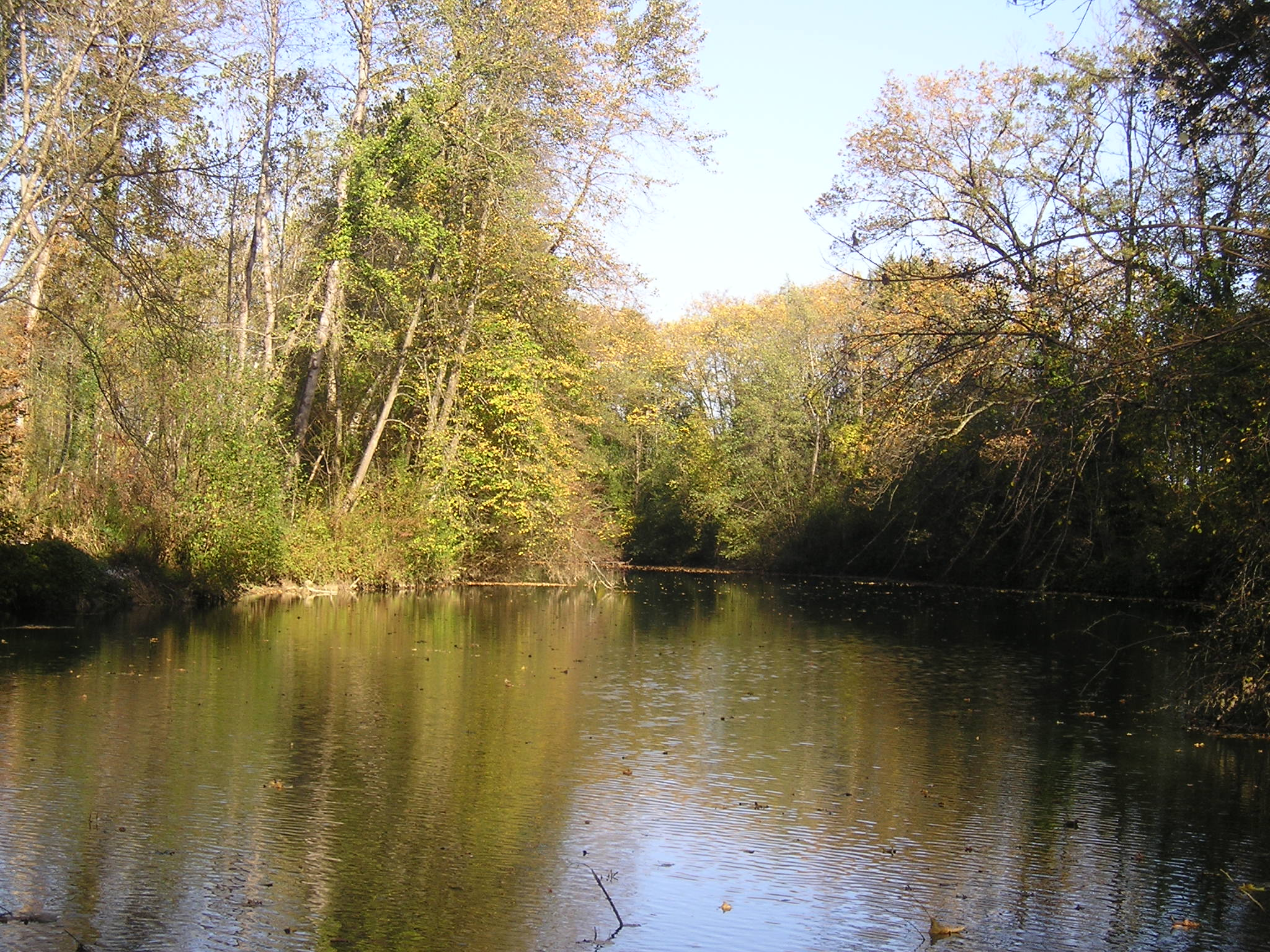 L'aube près d'Unienville novembre 2006